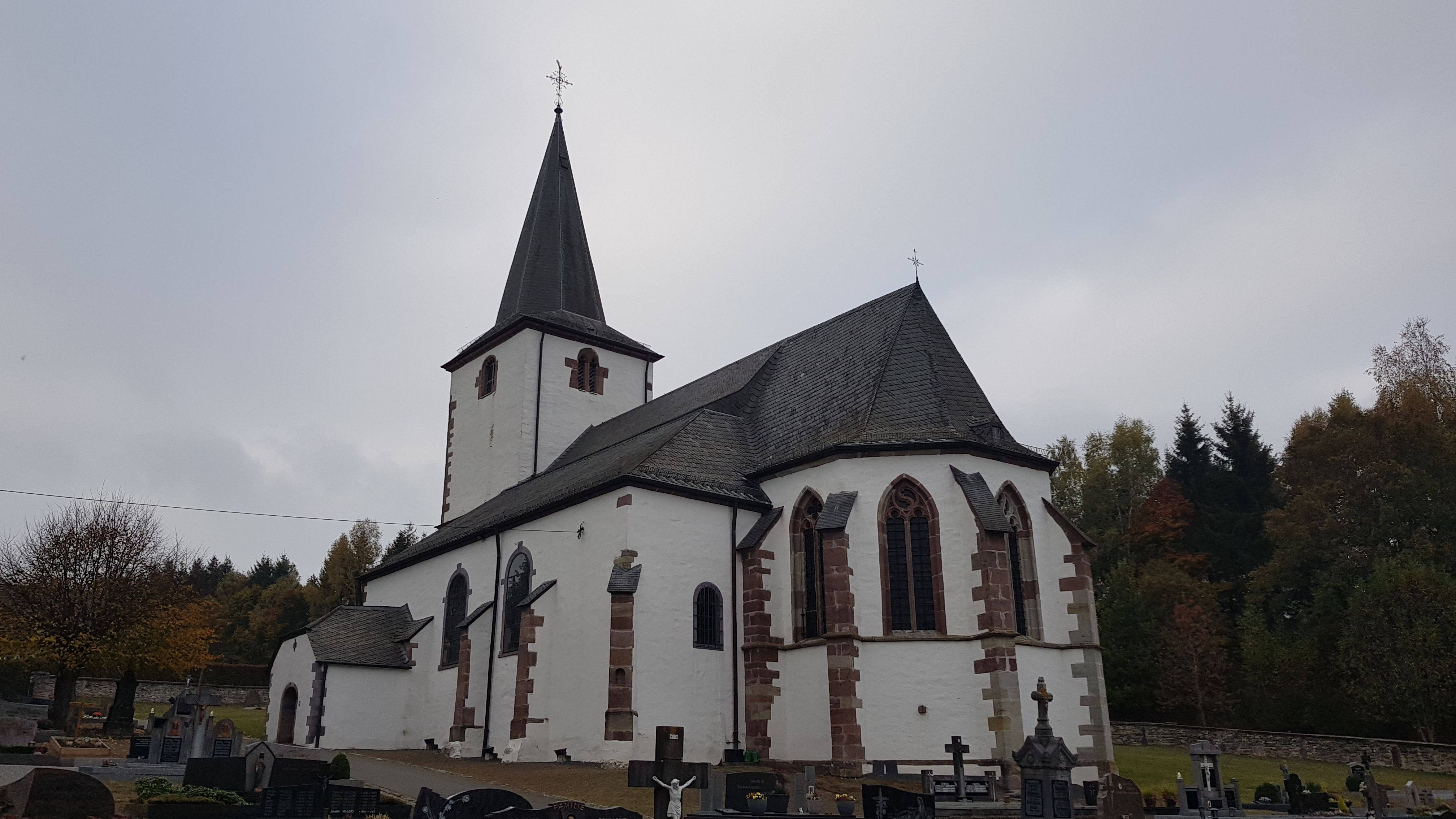 Mutter-Gottes-Kirche, Neundorf, Sankt Vith, Belgien This photo of immovable heritage has been taken in the Walloon Region